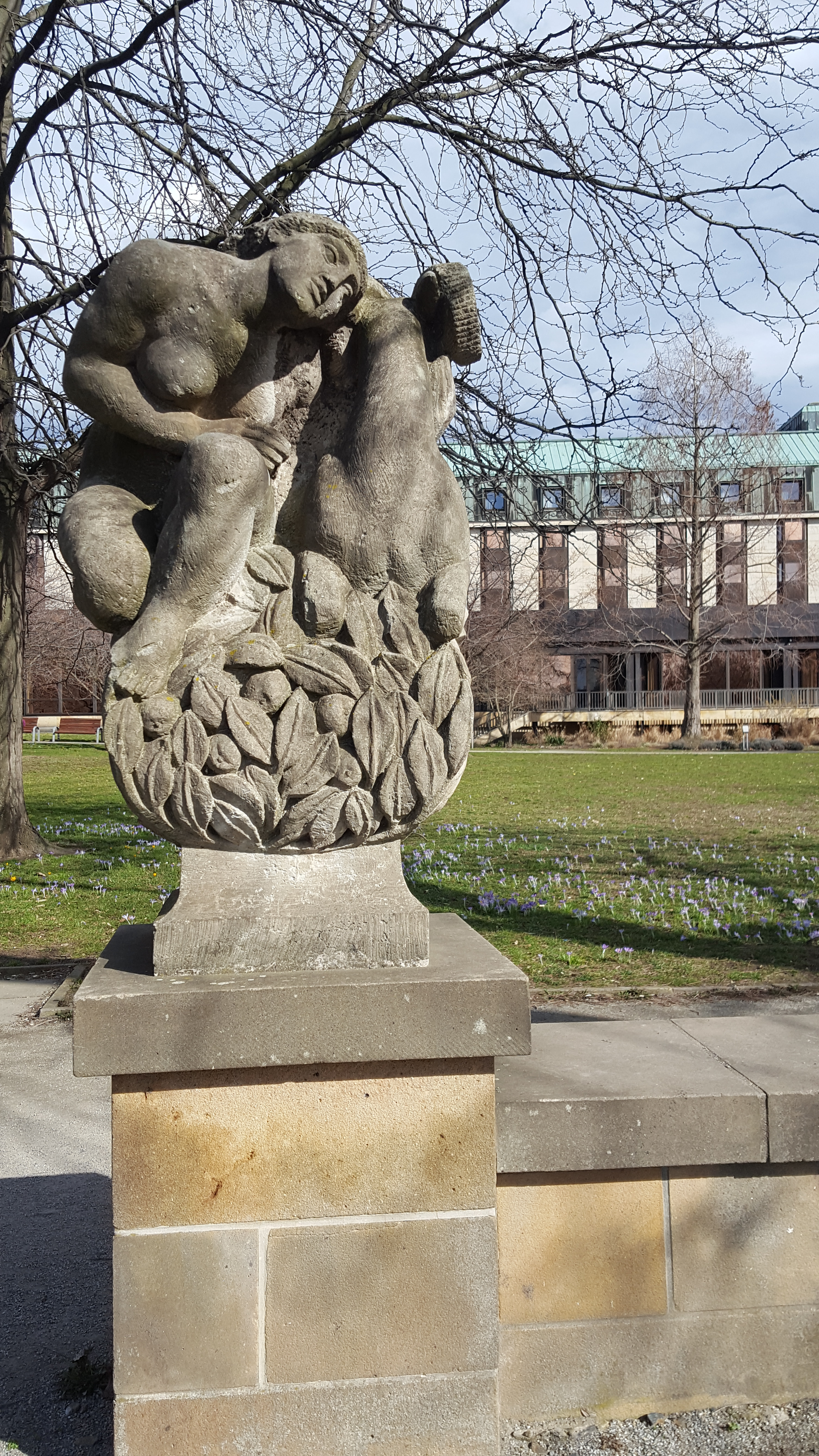 Frau mit Ziegenbock Sandsteingruppe, Garten am Hotel Bellevue, Dresden, 1986 vom Dresdner Bildhauer Christian Schulze